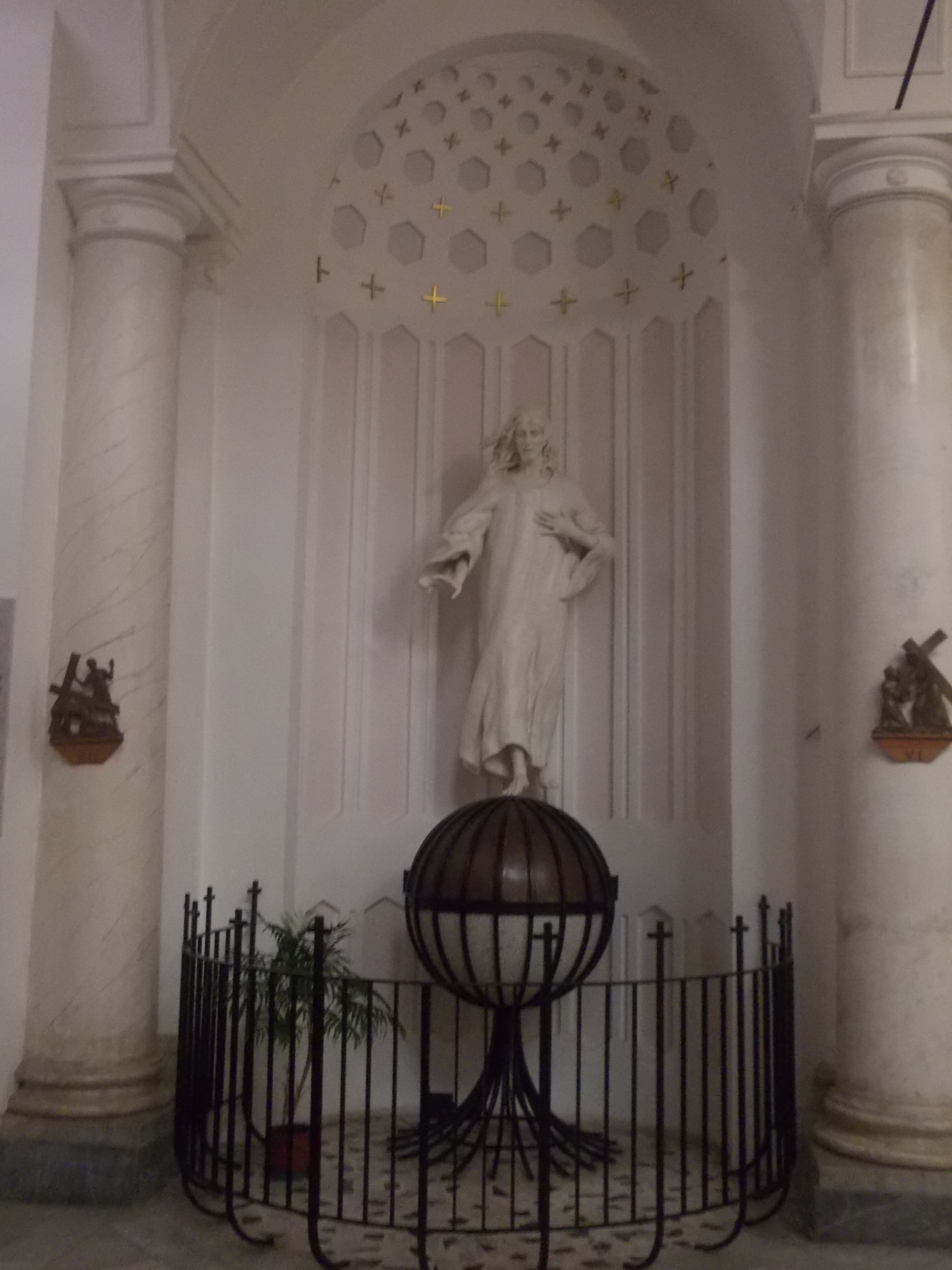 Progettata dall'architetto Luigi Giffone con il Cristo di Michelangelo Parlato, chiesa del Rosario di Polistena. Foto di Guerrisi'79, opera propria.